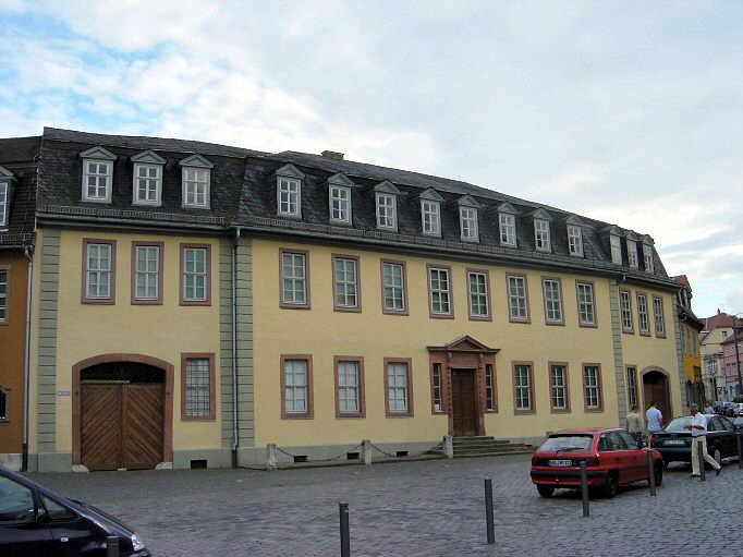 Woonhuis van Goethe in Weimar. Eigen foto, augustus 2004.